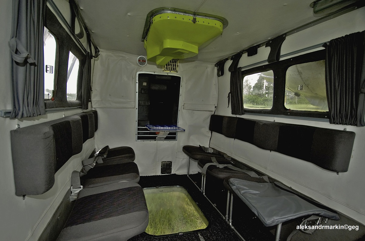 Helicopter Ka-26